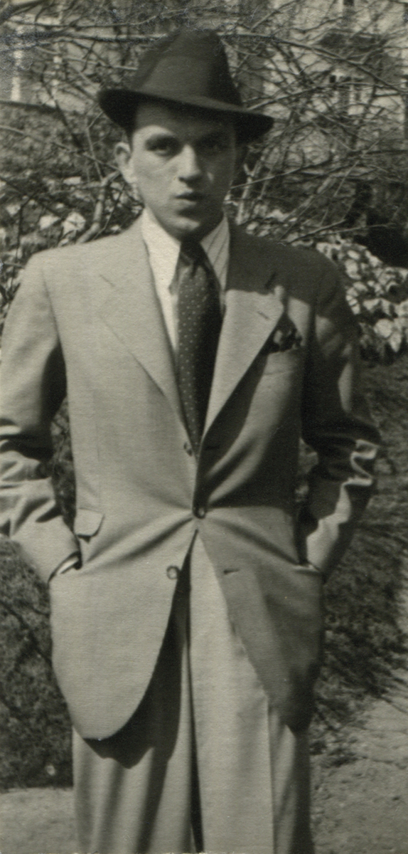 Aufnahme von 1940